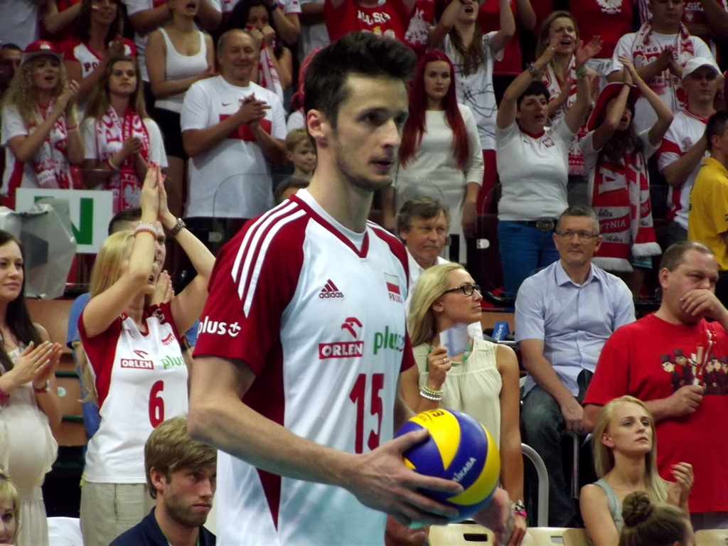 Zdjęcie zrobione podczas meczu Polska - USA siatkarskiej Ligii Światowej w katowickim Spodku.